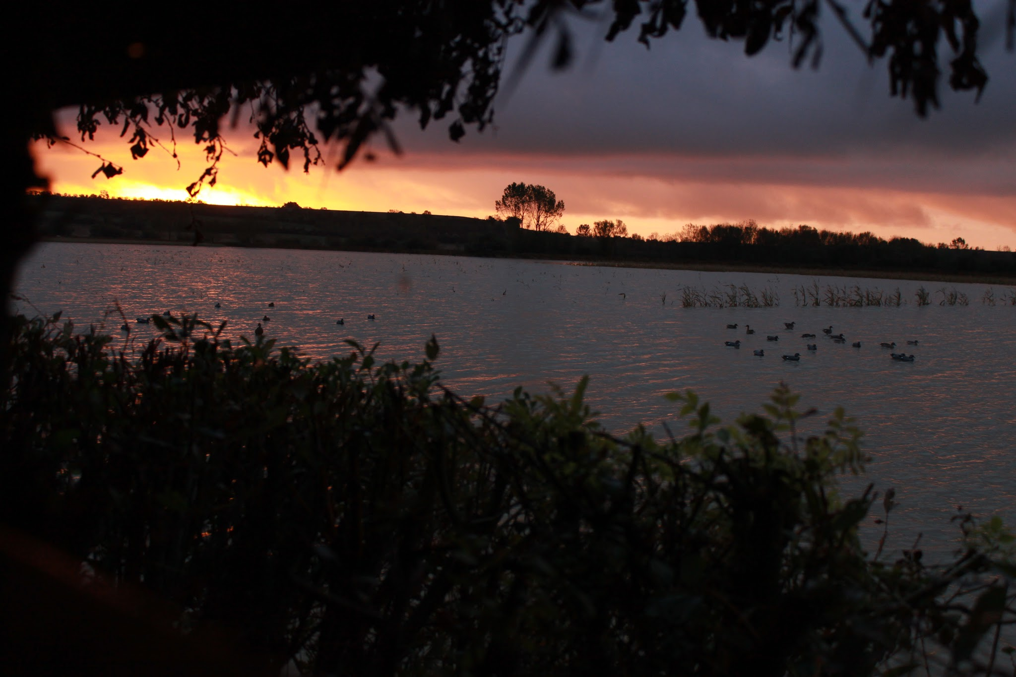 Appelants et plastiques vus d'une tonne (sur pilotis dans un marais inondable)